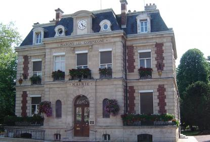 Mairie de Margny-lès-Compiègne